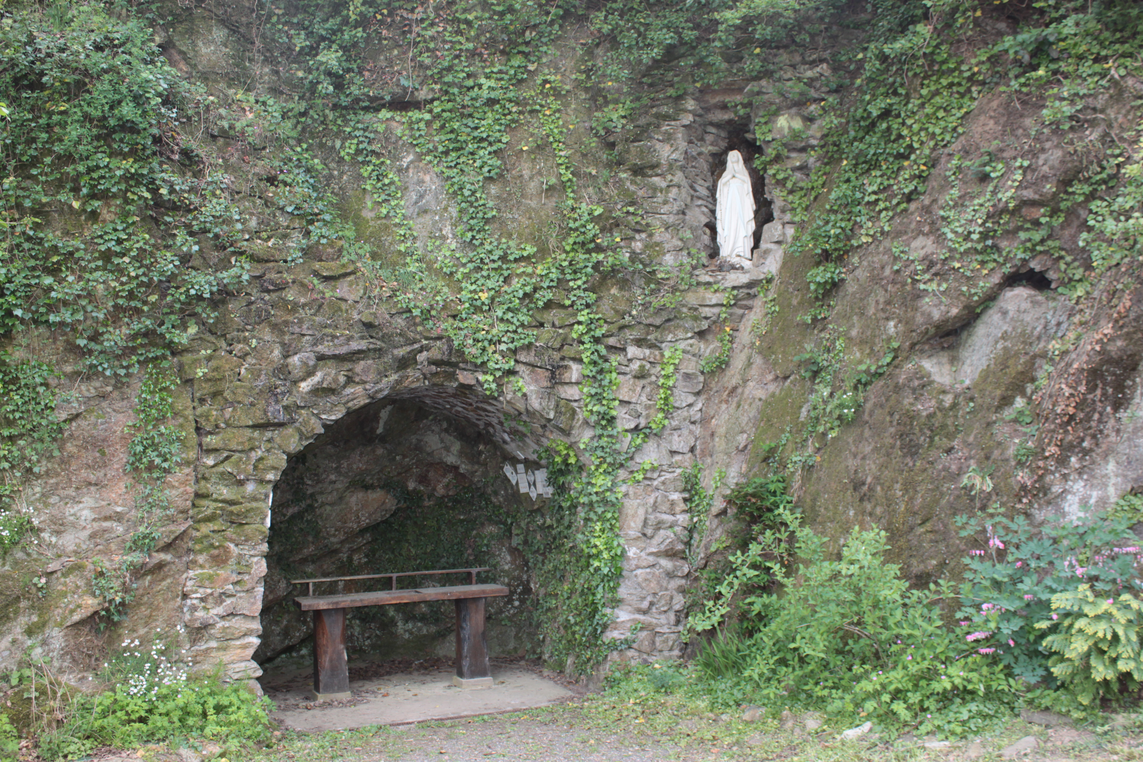 Route de Landemont, Fr-44-La Remaudière.